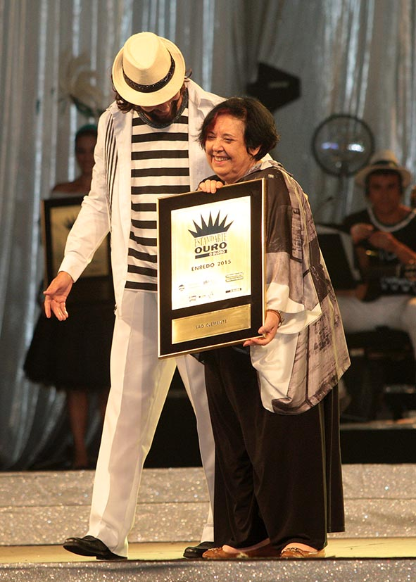 Fotógrafo Henrique Matos